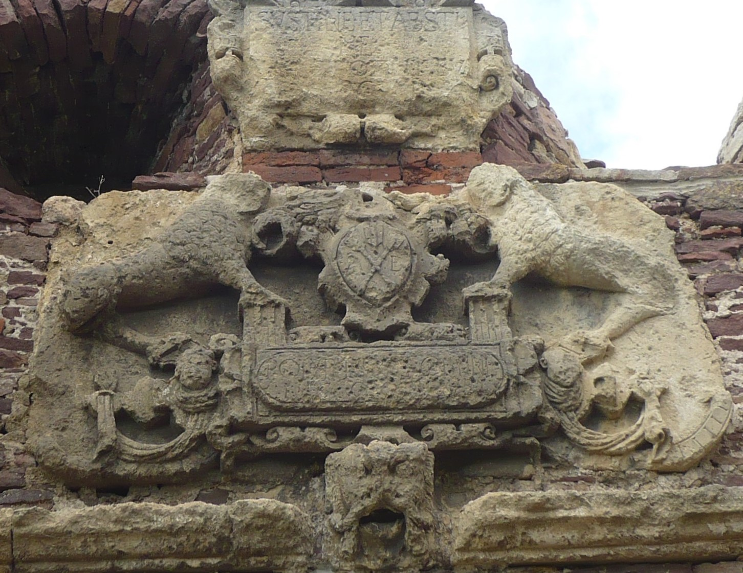 Podzameczek.Zamek